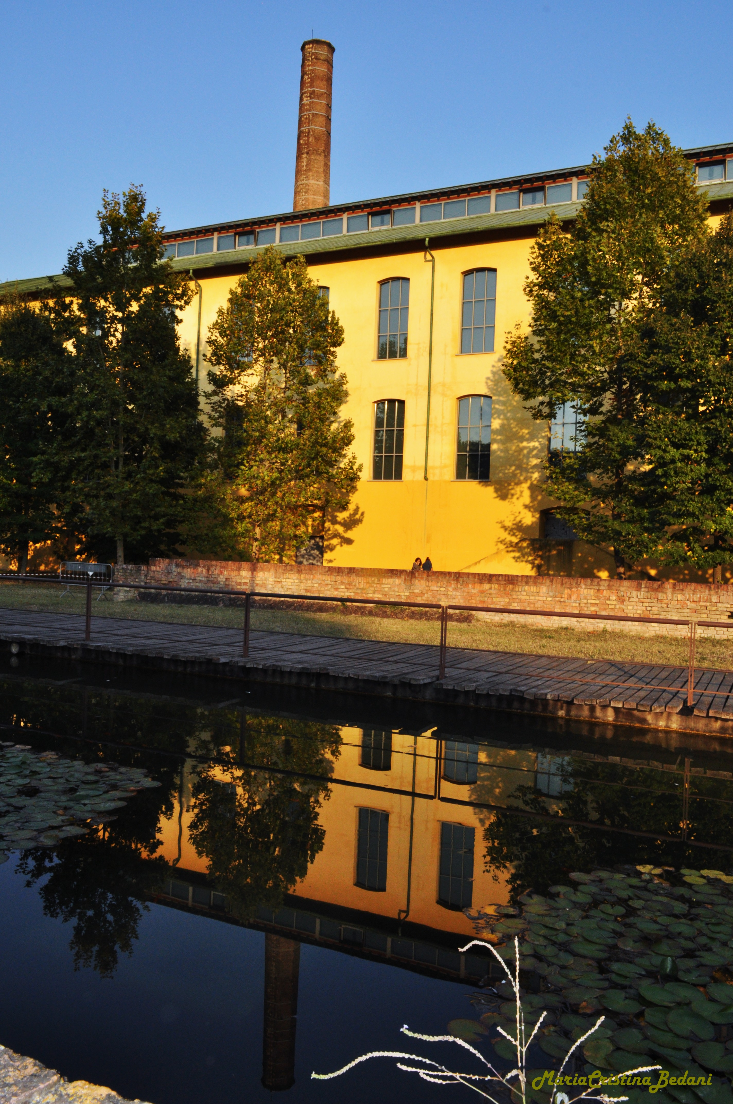 L'Auditorium Paganini , situato nel cuore della città, all'interno di uno splendido parco, comprende 8 sale polifunzionali, con una capacità di oltre 2000 posti. Dispone inoltre di una sala stampa, di un'area catering e di alcuni spazi espositivi. Immerso nel verde di un secolare parco arricchito di splendide fontane che ne esaltano i contorni, l'Auditorium Paganini, a pochi minuti dal centro cittadino, è uno splendido esempio di recupero di architettura industriale firmato da Renzo Piano, in grado di ospitare e dar vita a convention aziendali, congressi e meeting di medie dimensioni, oltre ad eventi musicali. Sala plenaria a platea: 780 posti con ribaltina su una superficie di 864 mq,aria condizionata, telefono diretto con l'esterno, cablaggio fibre ottiche, amplificazione, cabina regia, pc, collegamento Internet. Alla sala principale sono collegati altri 7 ambienti dotati delle più moderne strumentazioni tecnologiche, adatti ad ospitare qualsiasi tipologia di pubblico.